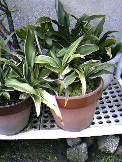 オモトの写真。2007年3月27日に投稿者が自宅（大阪府）近くで携帯電話で撮影。